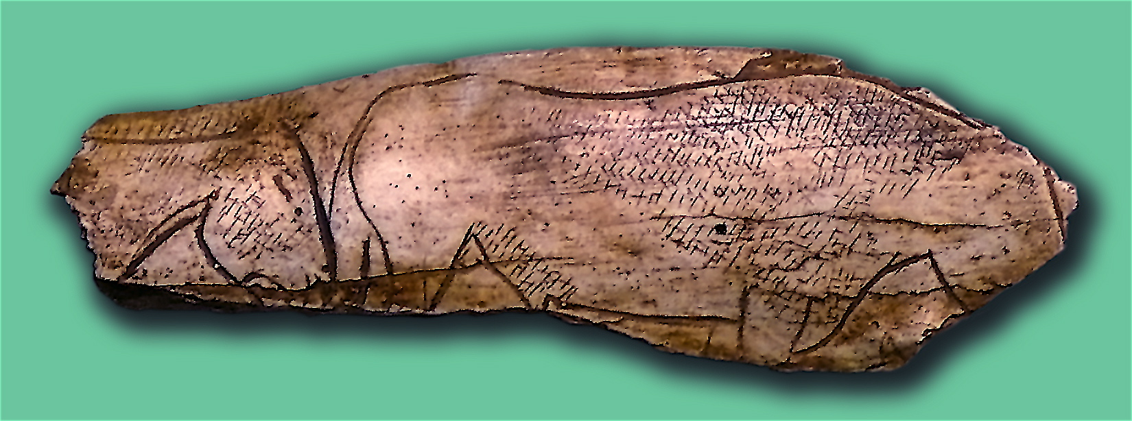 Placa ósea con grabados de équidos en los que se imita el pelaje con la técnica del microsurco. Procede de la Cueva de El Pendo, Carmargo, Cantabria (España) y ha sido relacionado con una fase del Magdaleniense final